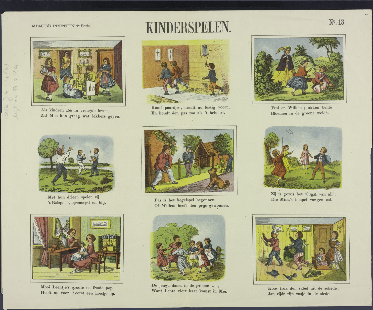 Oblong centsprent met 3 x 3 dubbel omkaderde in kleur gedrukte litho's, met afbeeldingen van kinderspel: met poppen en keukentje, paardje spelen, bloemen plukken, ballen, kegelen, met een hoepeltje gooien, poppen aankleden, dansen in de wei en soldaatje spelen. Met tweeregelige rijmende onderschriften.